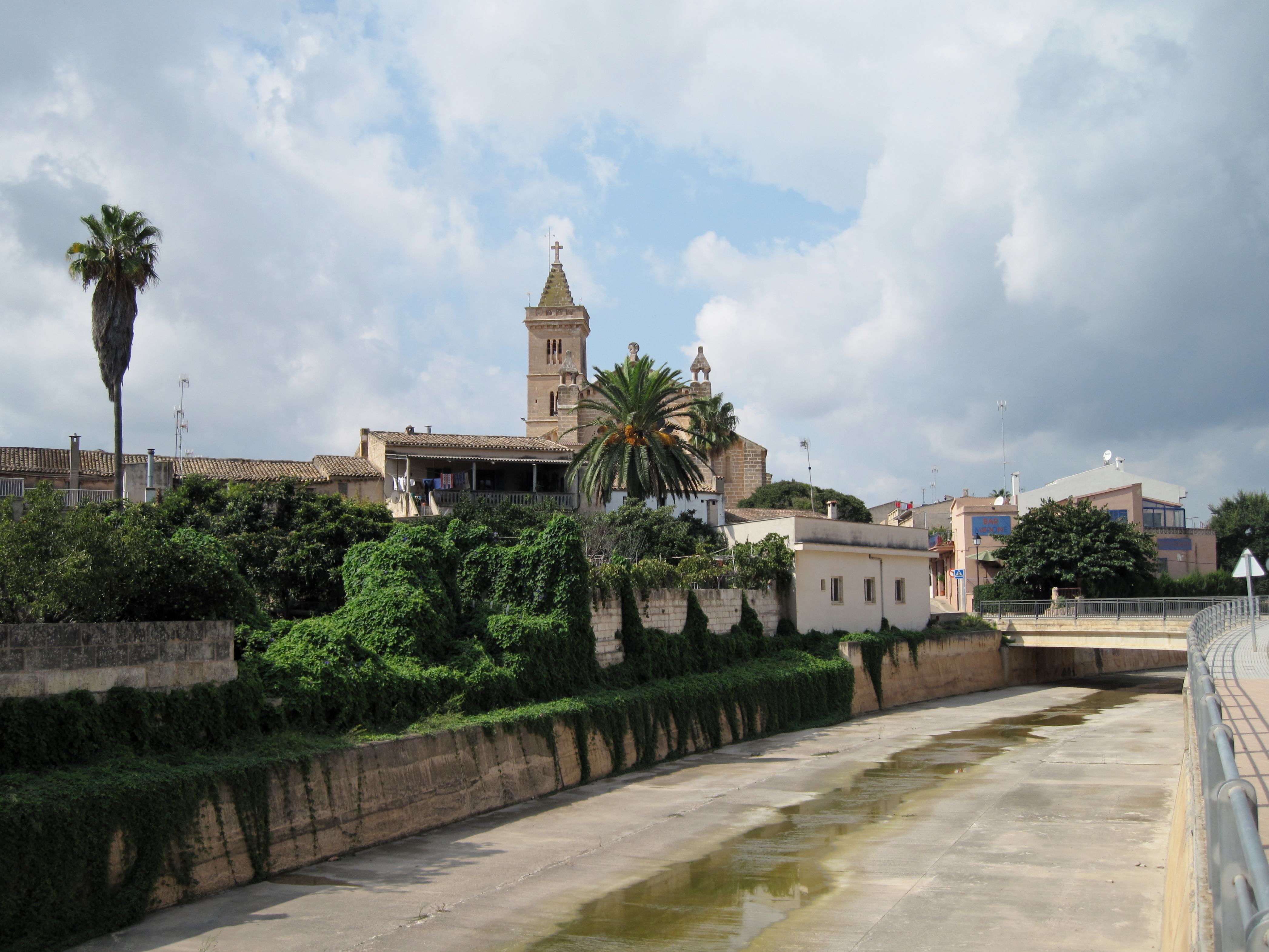 Son Carrió am kanalisierter Sturzbach Torrent de Ca n’Amer, Mallorca, Spanien